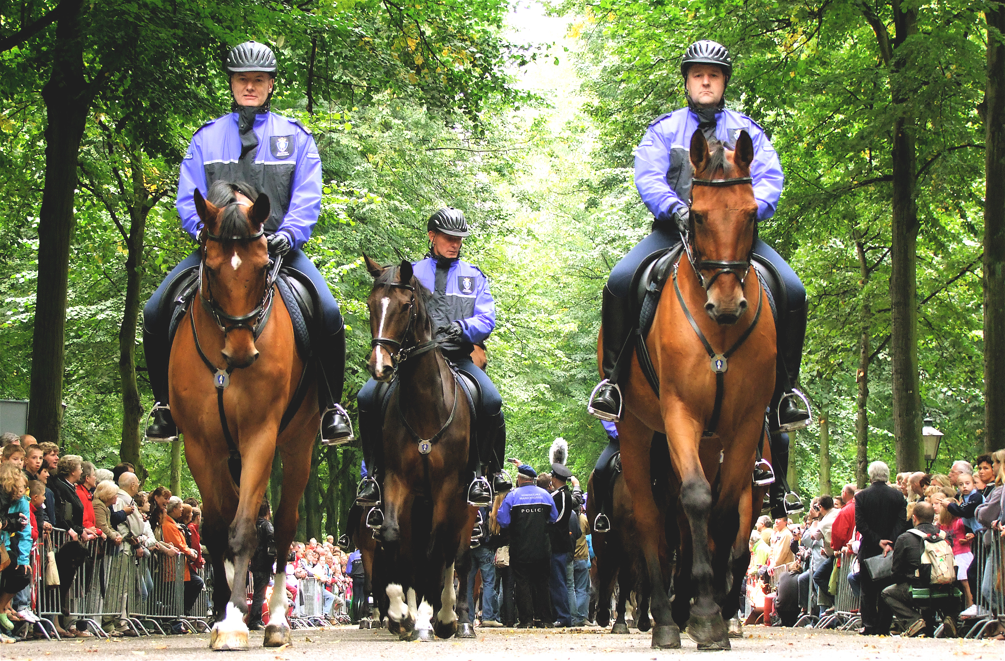 Voor het eerst in de geschiedenis oefent het Bereden Ere-Escorte van de Koninklijke Marechaussee op het Lange Voorhout In Den Haag. Dit ter voorbereiding op Prinsjesdag. De oefening vond plaats op zaterdag 13 september van 14.00 tot 15.00 uur.